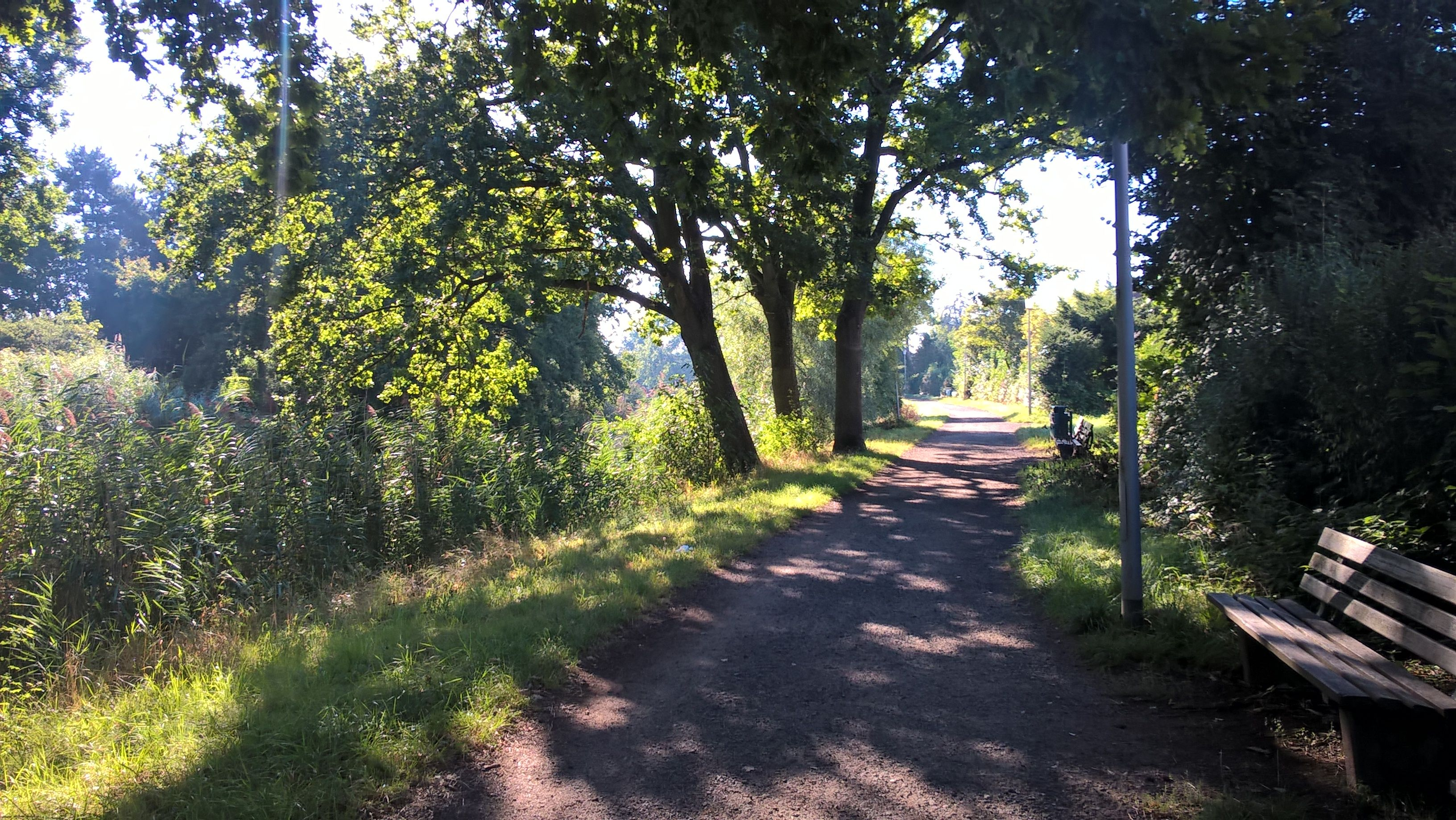 Spazier- und Radweg entlang der Horlache (Grenze Haßlochs im Norden)